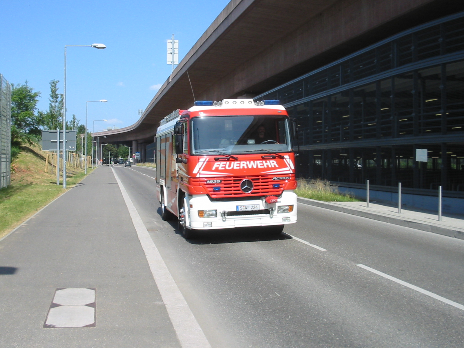 Vehicle of the DaimlerChrysler Plant Fire Brigade Stuttgart-Untertürkheim (truck: Mercedes-Benz Actros, assembly: Rosenbauer)